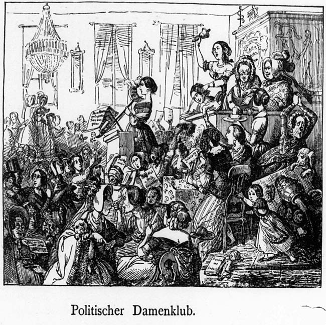 "Politischer Damenklub", erstmals erschienen 1849 als "Politischer Damenclubb" im "Satyr", S. 14f.